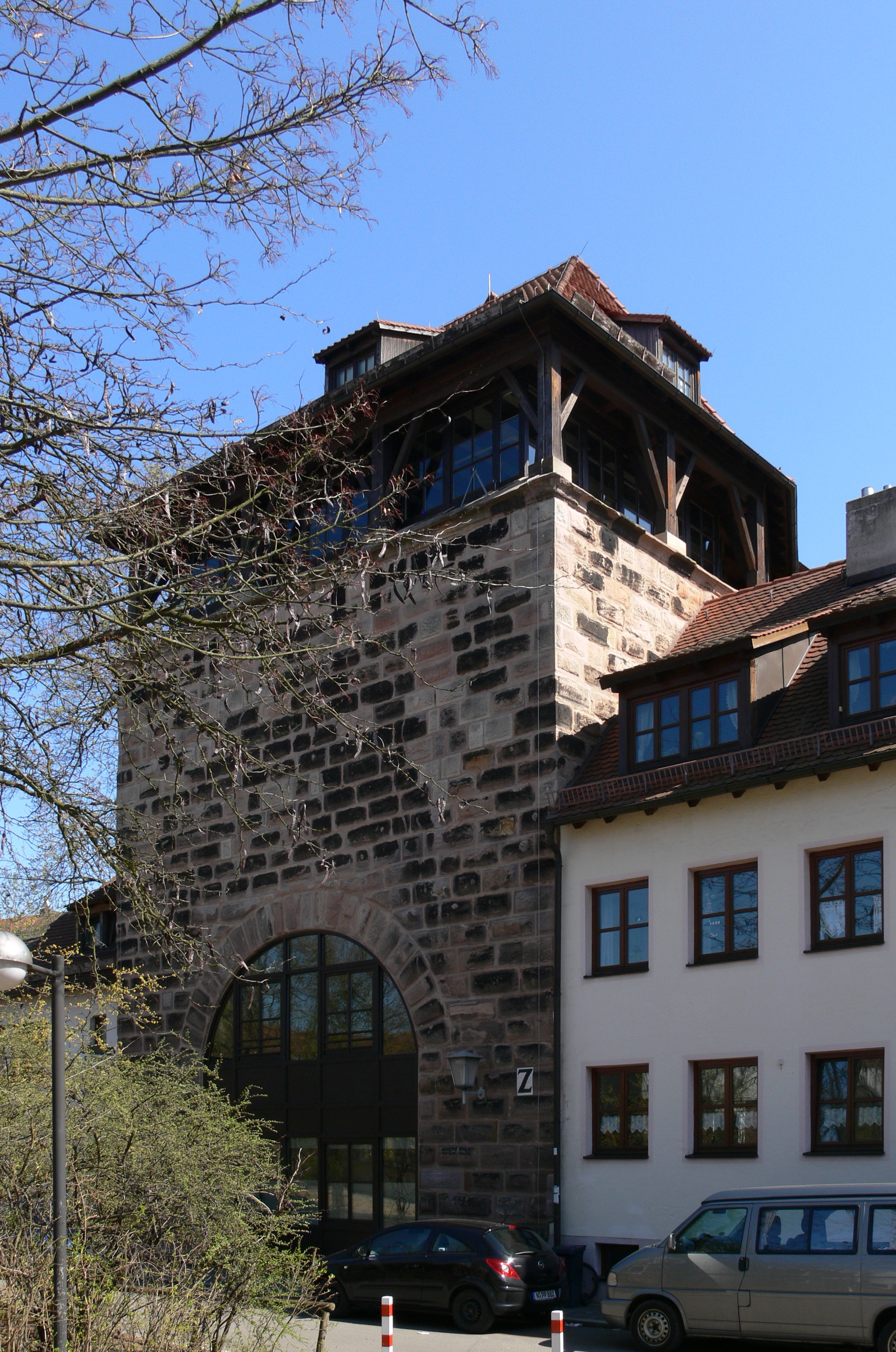 Nürnberg, Hintere Insel Schütt, Turm Schwarzes Z (Hintere Insel Schütt Nr. 34), auch „Krakauer Haus“ genannt, einer der beiden „Wehrtürme am Tratzenzwinger“, Stadtseite